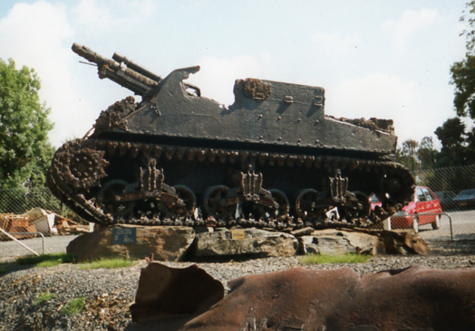 M7 Priest - musée des épaves - Port-en-Bessin